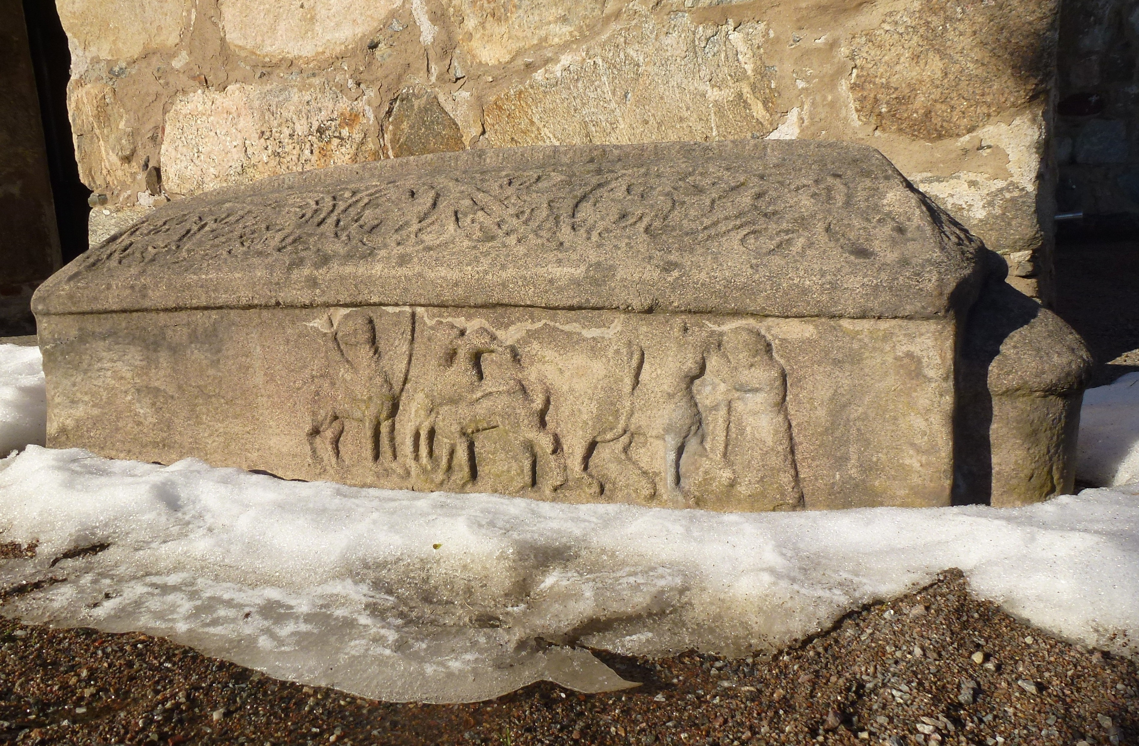 Botkyrkamonumentet Sö 286 utanför Botkyrka kyrka